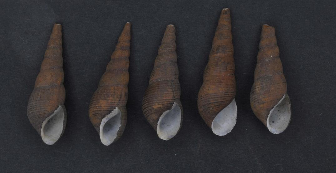 Melanoides tuberculata (Müller, 1774)